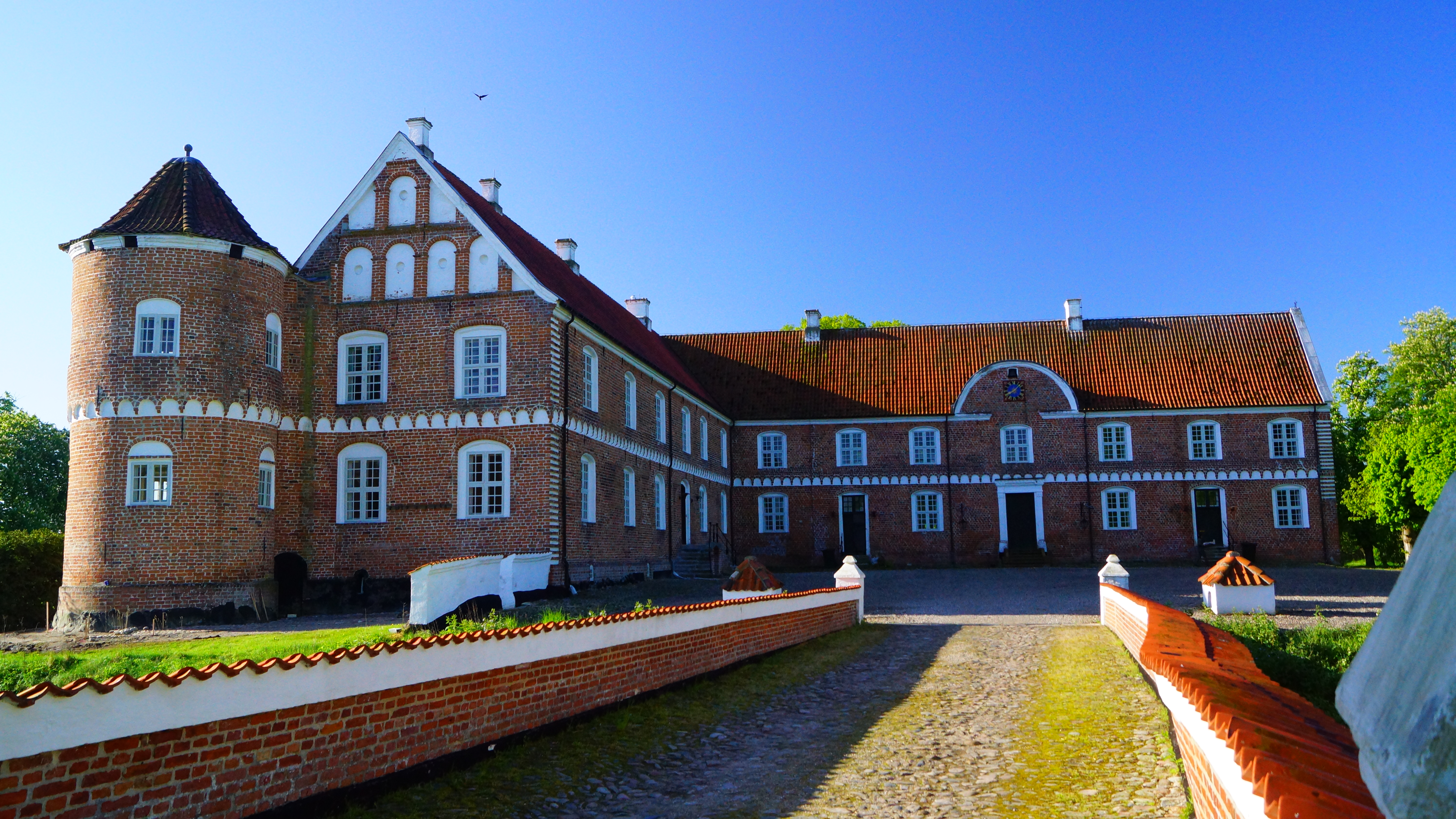 Løvenhom Slot, Djursland, Denmark